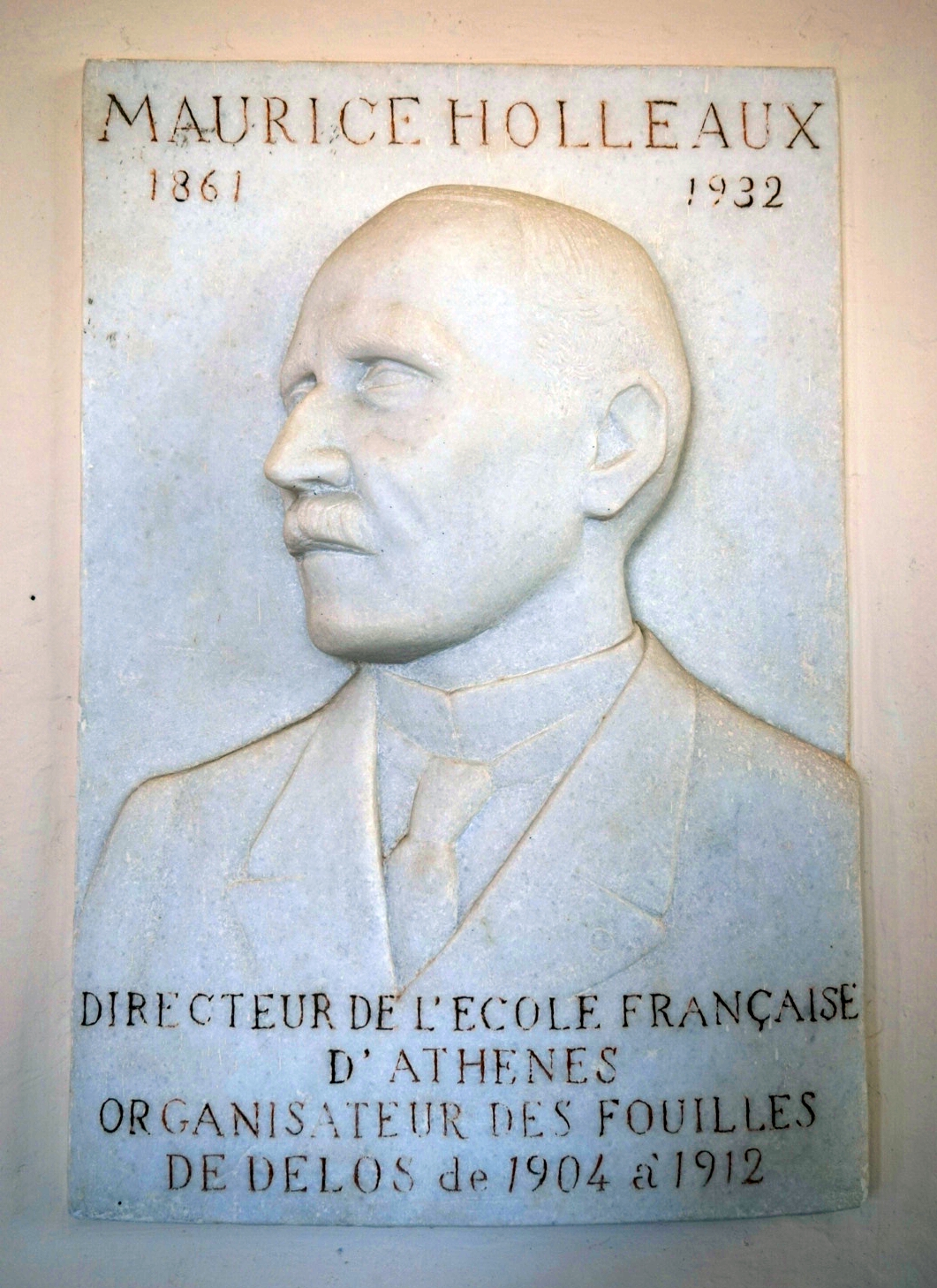 Bas-relief de Maurice Holleaux, au Musée archéologique de Délos, Cyclades, Grèce.